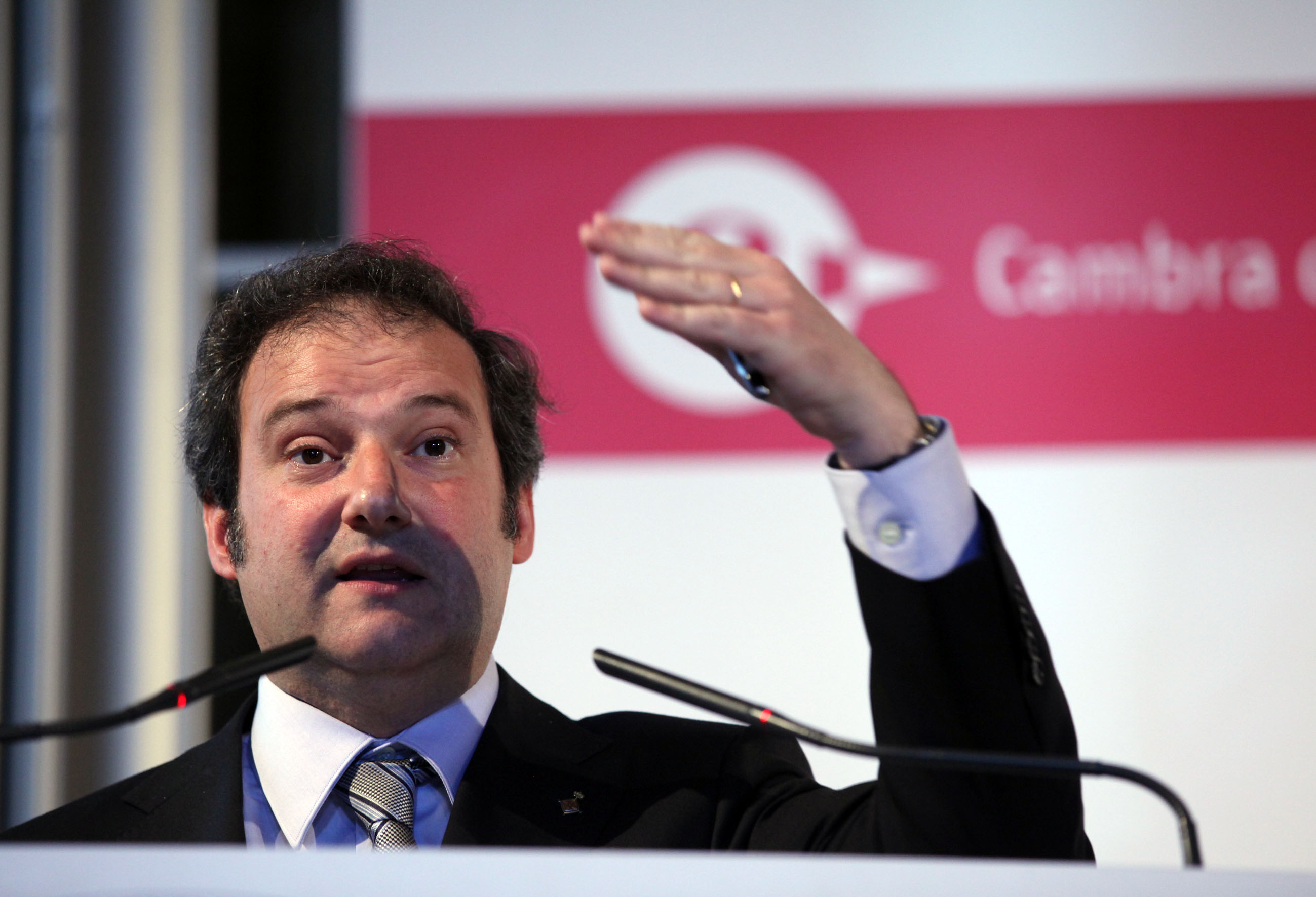 Dinar Cambra amb el candidat a l'alcaldia de Barcelona pel PSC i actual alcalde de la ciutat.